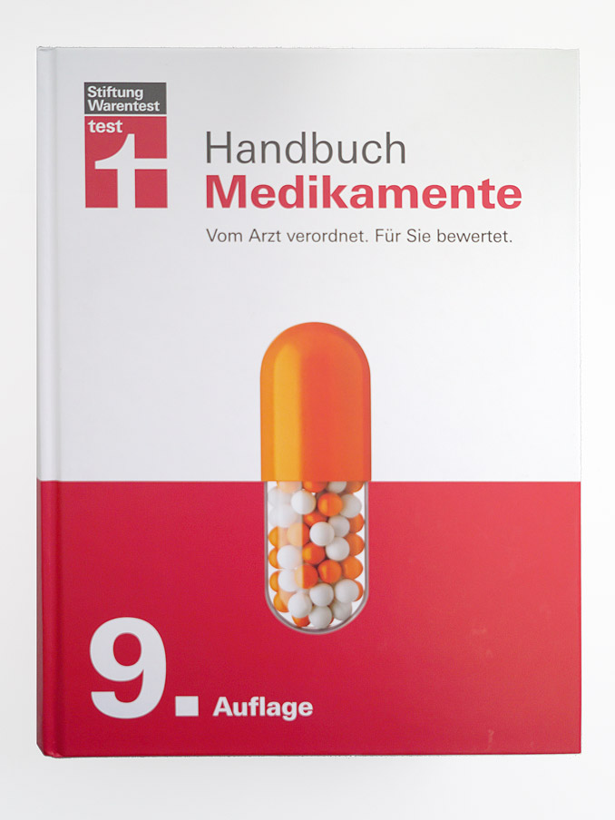 Abbildung der neunten Auflage vom Handbuch Medikamente